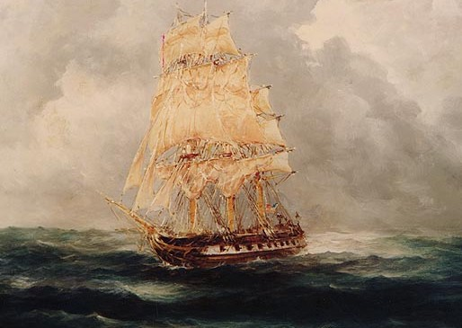 This image is a work of a sailor or employee of the U.S. Navy, taken or made during the course of the person's official duties. As a work of the U.S. federal government, the image is in the public domain. - Photo #: NH 86690-KN (color) USS Boston (1826-1846) Painting by Rod Claudius, Rome, Italy, 1962. It was made for display on board USS Boston (CAG-1). Courtesy of the U.S. Navy Art Collection, Washington, D.C. U.S. Naval Historical Center Photograph.